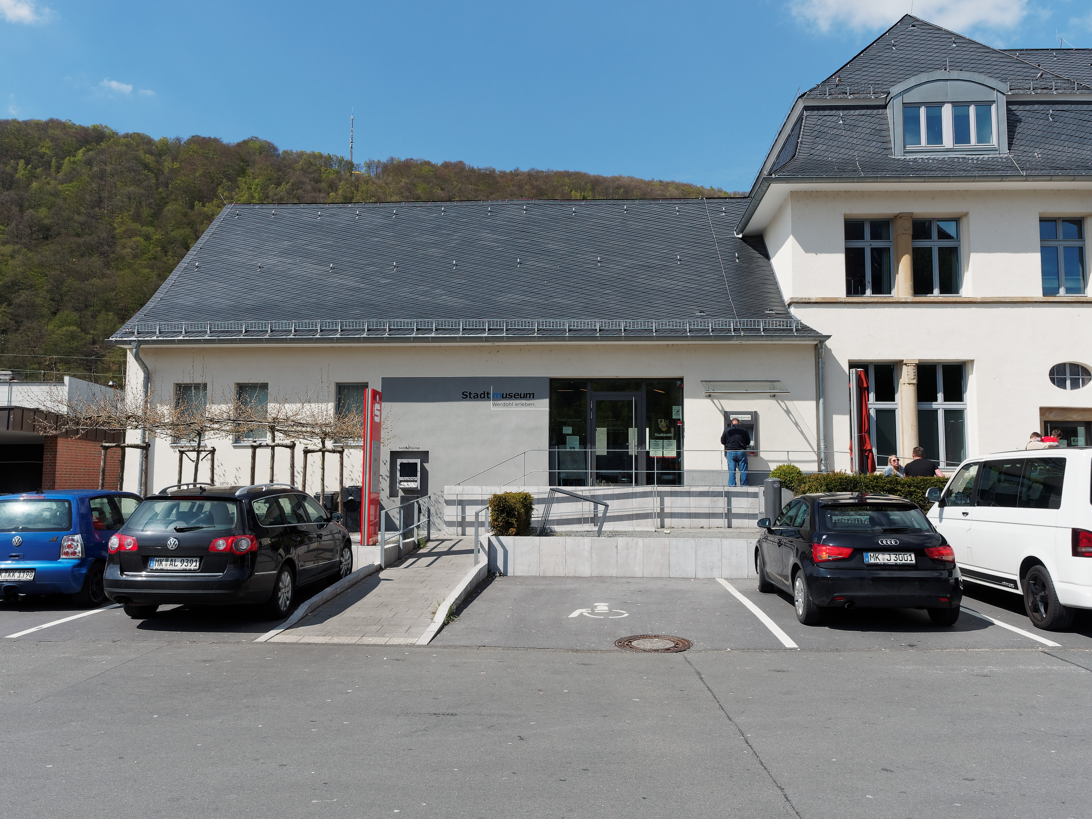 Stadtmuseum Werdohl, Ansicht von Süden